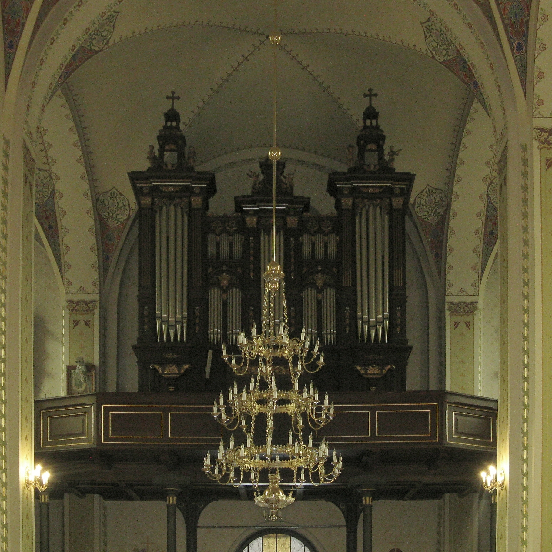 Rajcza, Kościół św. Wawrzyńca i św. Kazimierza Królewicza w Rajczy, neoklasycystyczny prospekt organów zbudowanych przez Jana Grocholskiego, ukończonych w 1897 roku. Wikidata has entry Q11747537 with data related to this item.